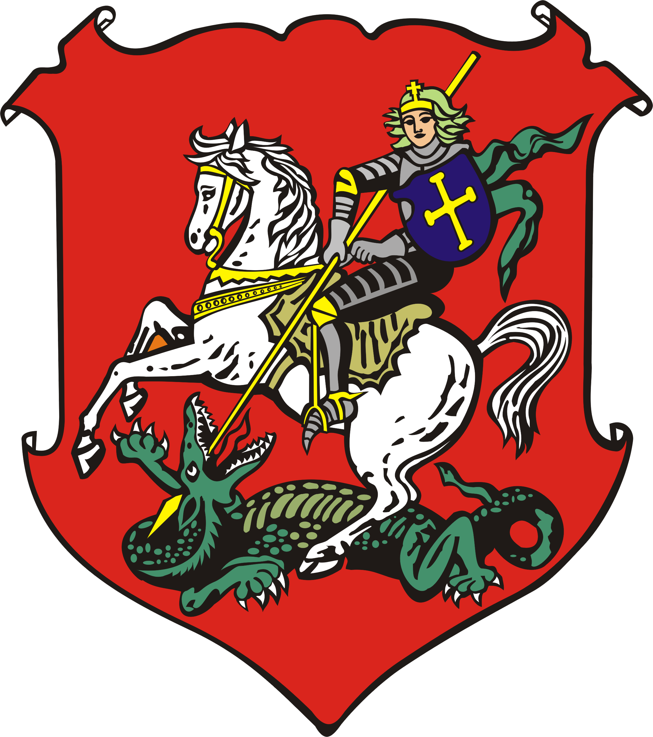 Heraldický znak města Vysoké Mýto